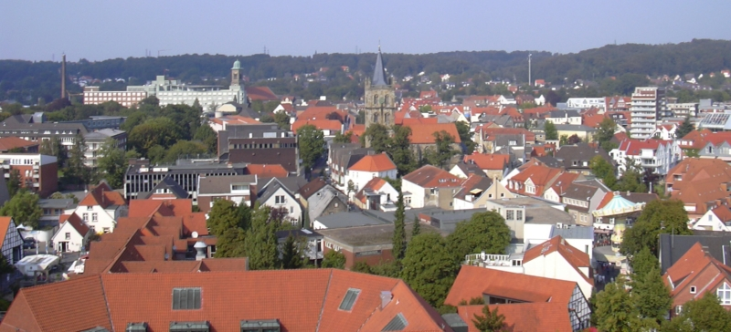 Ibbenbüren, Panorama mit Krankenhaus, Christus- und Mauritiuskirche